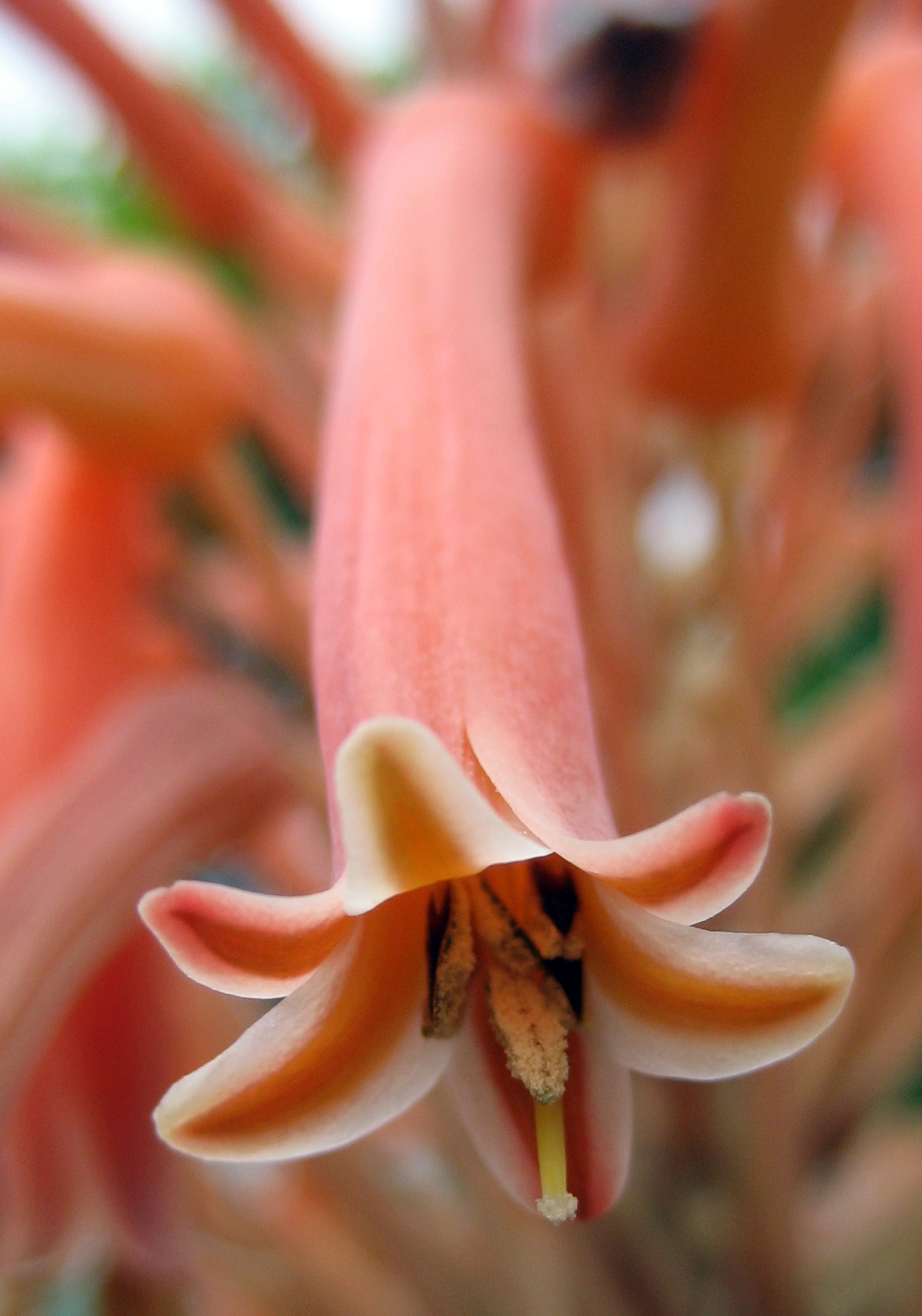 Aloe maculata Asphodelaceae, flor